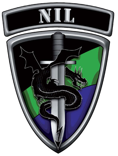 Oznaka rozpoznawcza JW NIL ustanowiona decyzją Nr 305/MON MINISTRA OBRONY NARODOWEJ z dnia 10 sierpnia 2010 r. w sprawie wprowadzenia odznaki pamiątkowej oraz oznaki rozpoznawczej Jednostki Wsparcia Dowodzenia i Zabezpieczenia Wojsk Specjalnych